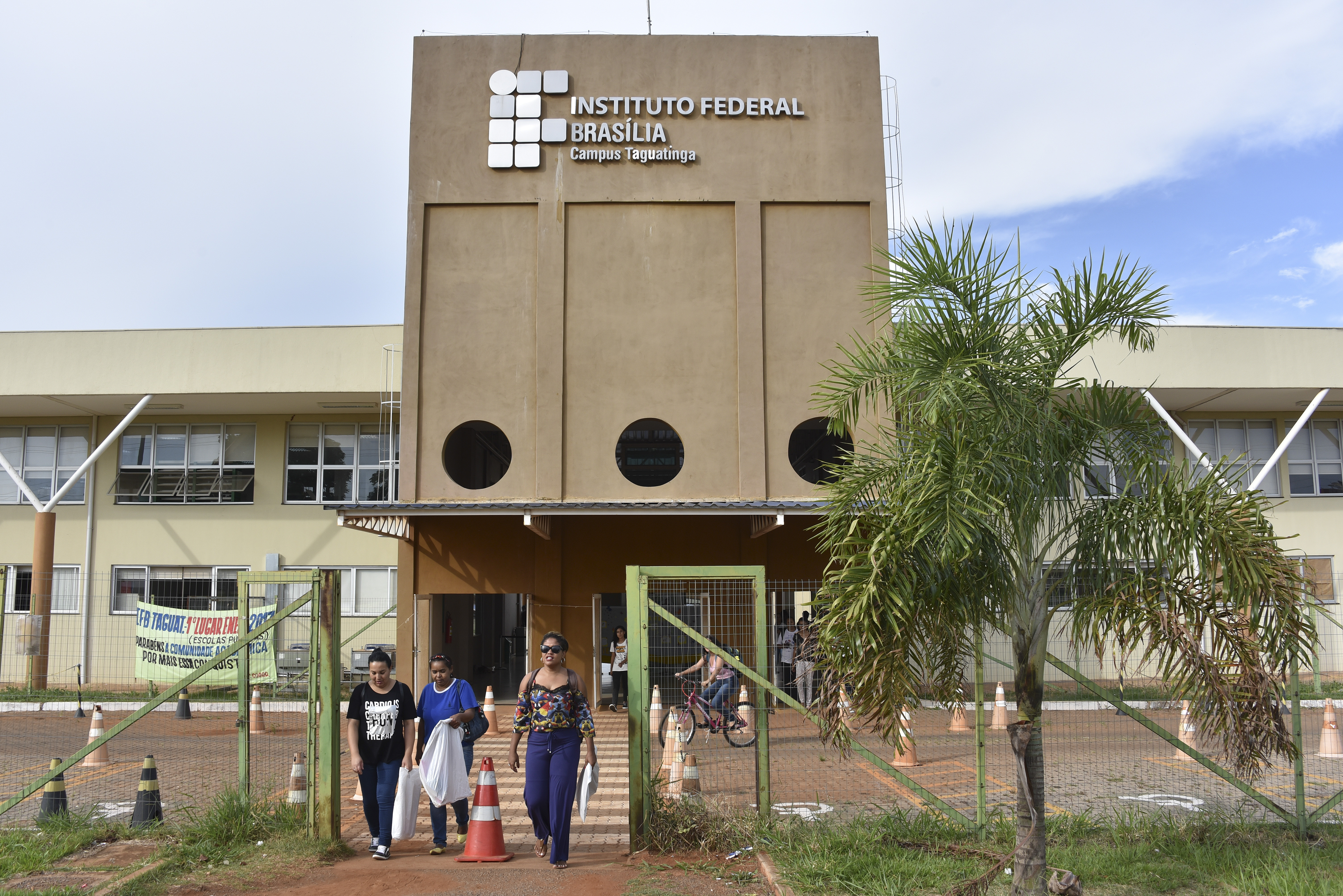 Uma saída para os jovens que não trabalham, nem estudam seria promover condições para que se reintegrem à escola e/ou ao mercado de trabalho. Um exemplo é o trabalho do IFB, que oferece cursos técnicos além do ensino médio tradicional. O Instituto Federal de Educação, Ciência e Tecnologia de Brasília é uma instituição de ensino pública brasileira, com sede em Brasília, no Distrito Federal e com campus em diversas regiões administrativas do Distrito Federal. Nas fotos, aula do Curso técnico subsequente em Vestuário, no Campus de Taguatinga. Alunos chamados subsequentes são os que terminaram o ensino médio. Ingressam através de sorteio. Foto: Pillar Pedreira/Agência Senado